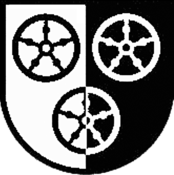 Wappen von Poppenhausen (Wasserkuppe)